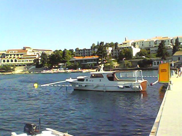 vaterpolsko igralište KPK